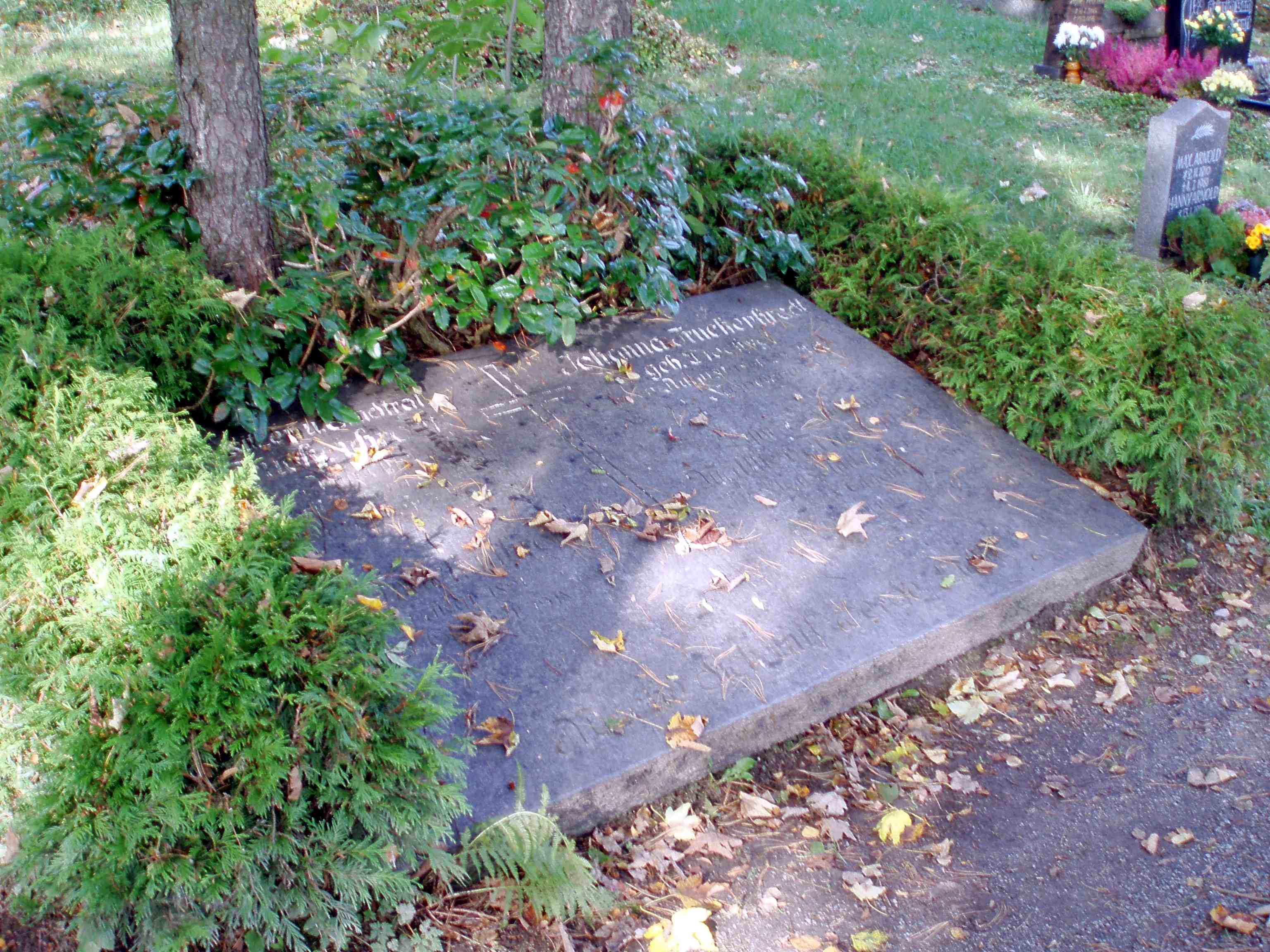 Truckenbrodt-Grabmal auf dem Friedhof in Johanngeorgenstadt